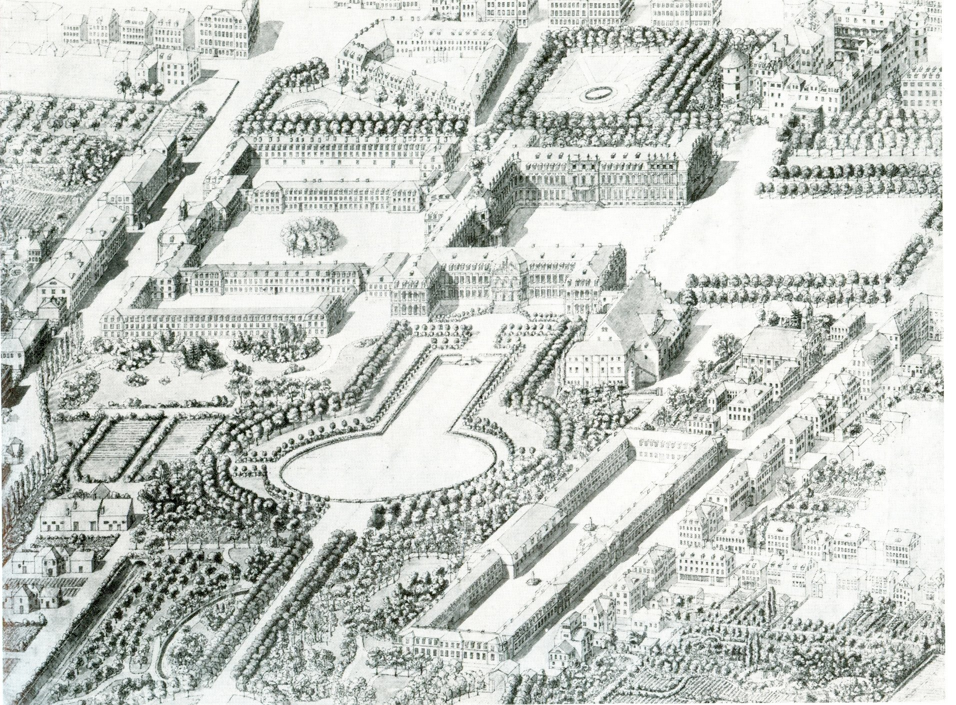 Residenzviertel Stuttgart, Federzeichnung, Stuttgart, Stadtarchiv, Inv.Nr. 588.